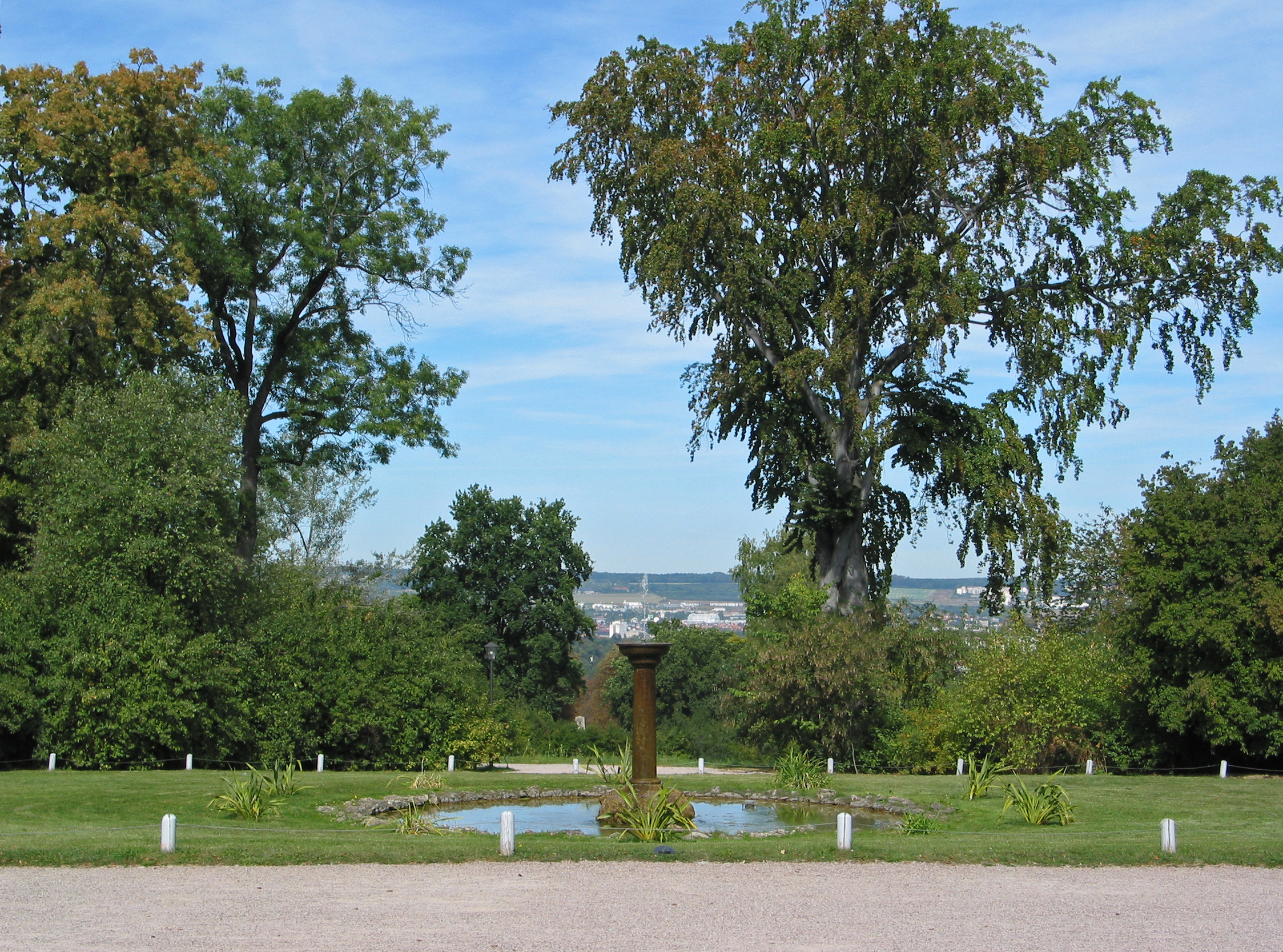 Die Schlossfontäne vor dem Rokoko-Museum Schloss Belvedere auf der Anhöhe "Eichenleite" mit Blick nach Norden auf die ca. 3km entfernte Stadt Weimar.